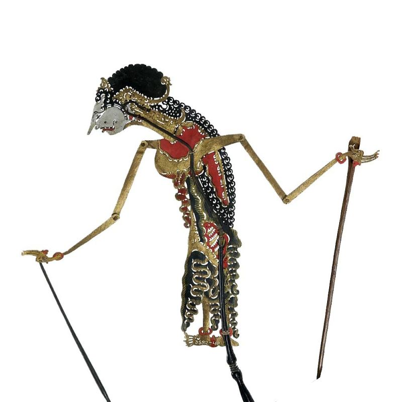 Schaduwfiguur. Wajangpop, voorstellende Satyawati Unknown language: Wayang kulit purwa